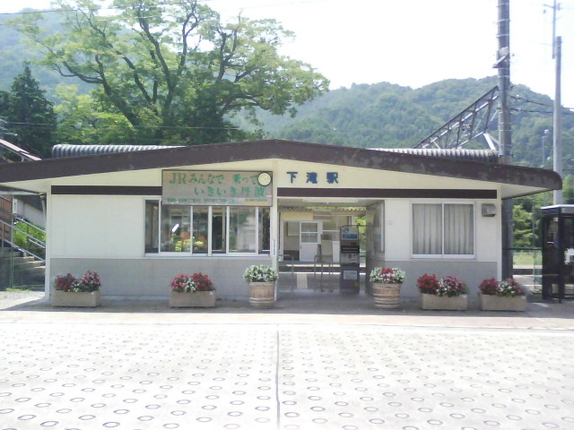 下滝駅駅舎(2009/8/19撮影）